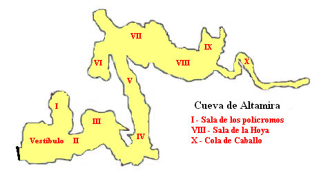 Plano de la cueva de Altamira. los números son los que asigno Henri Breuil.